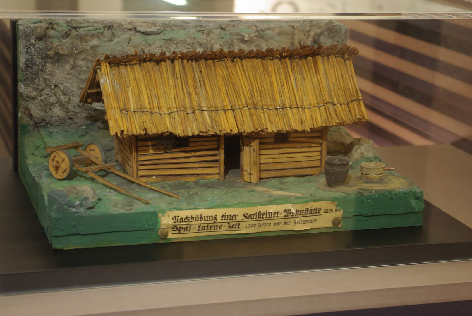 Modell Wohnhütte im Heimatmuseum in Bad Reichenhall